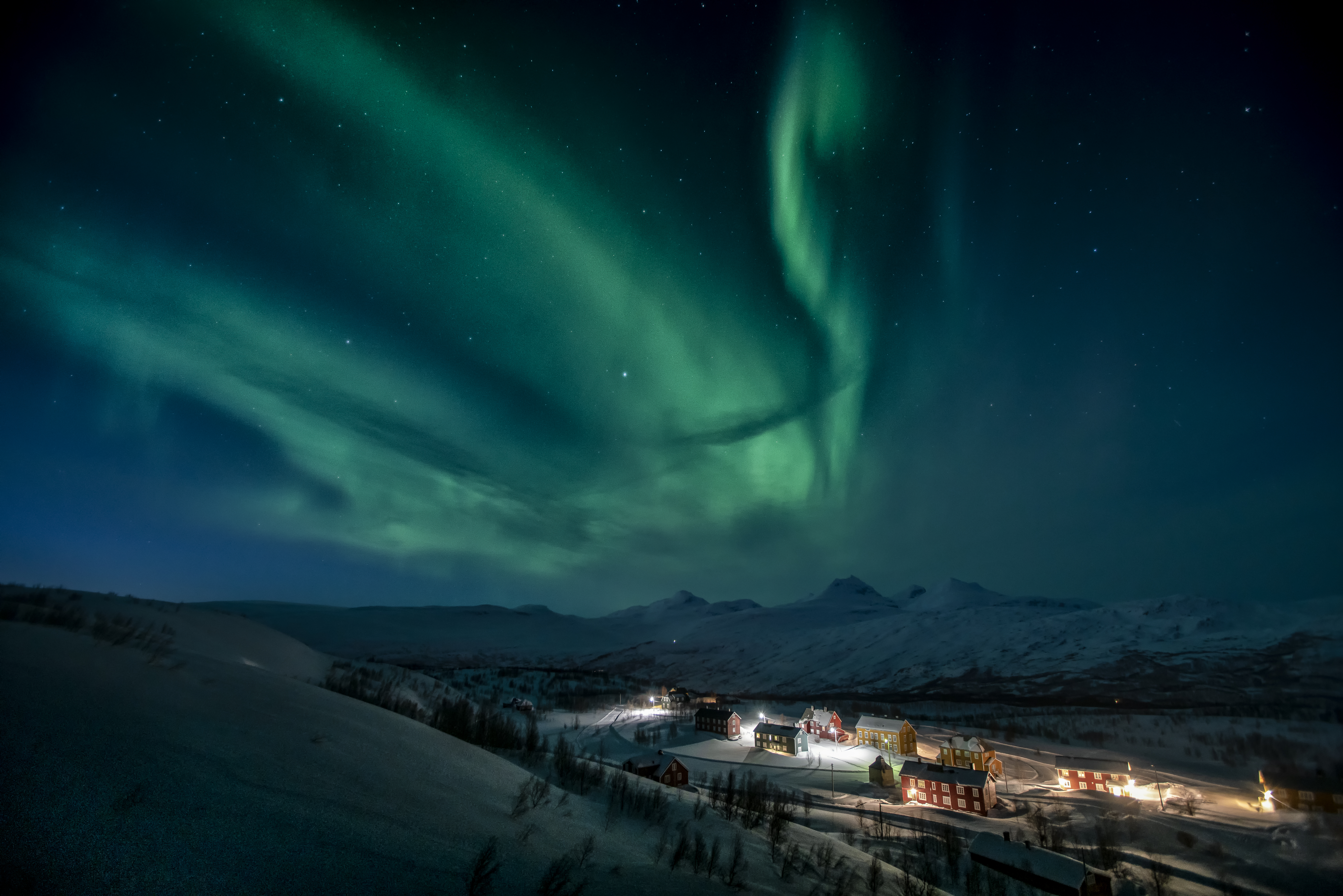 Foto: Bjørn Svendsen